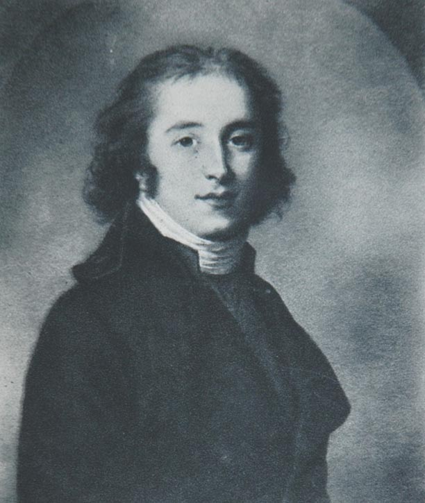 Szczęsny Jerzy Potocki